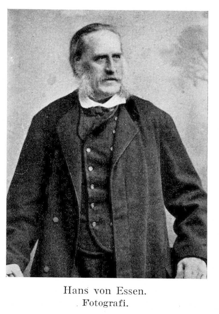 Hans Henrik von Essen (1820-1894), schwedischer Unternehmer Leiter der Tidaholms bruk, Mitbegründer der Vulcan-Zündholzfabrik und der Sphinx-Zellulose & Papierfabrik, alle in Tidaholm. Erbaute Schloss Helliden 1858/59.